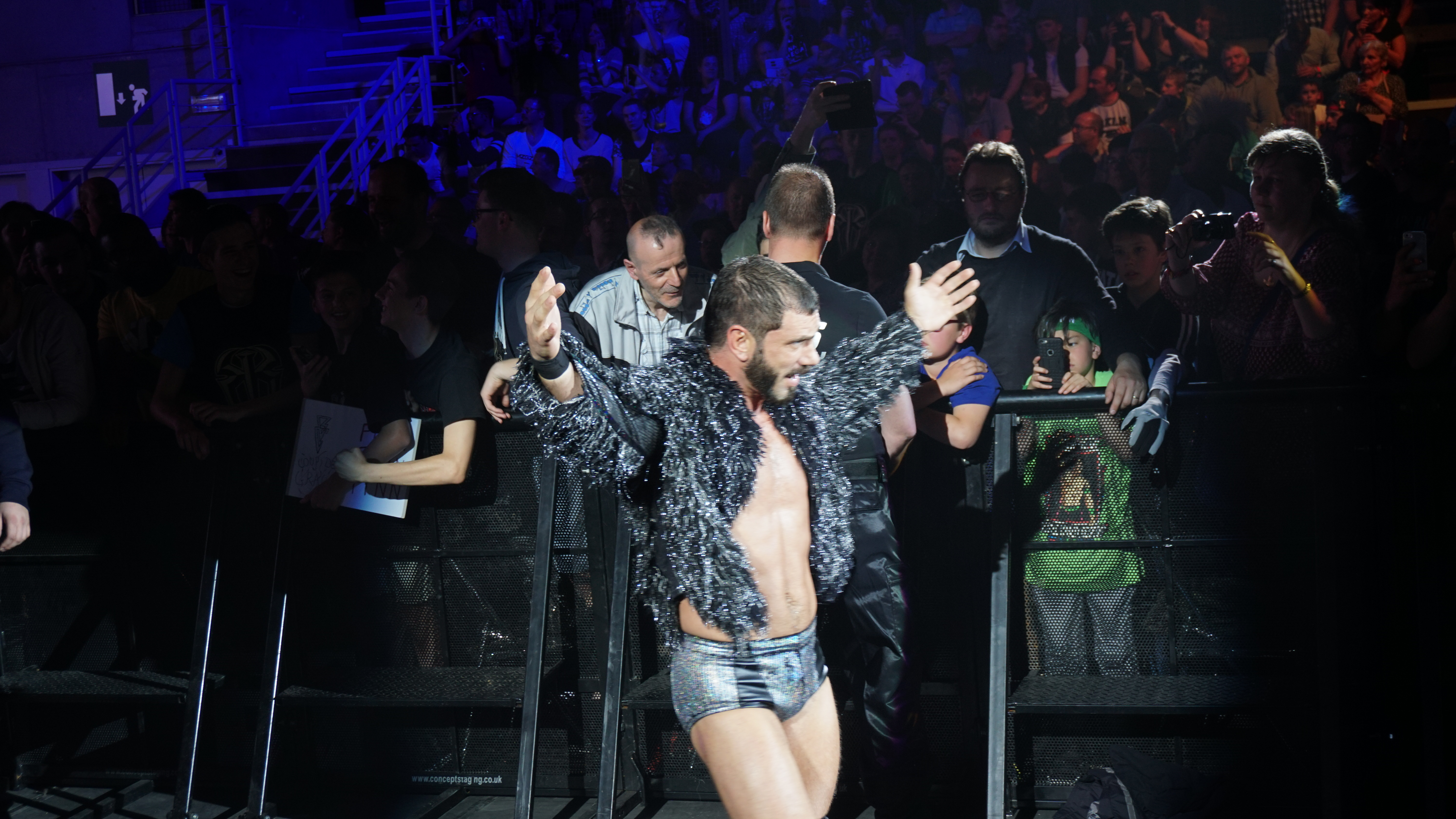 Neville (c) defeats Aleister Black & Austin Aries (in Title Triple Threat Match) Info on the match : WWE Cruiserweight ( Le vendredi 12 mai, la WWE Live Tour fera escale au Country Hall a Liege pour le spectacle de catch de l'annee! Au programme: des duels impitoyables et des rencontres captivantes entre les meilleures equipes et les plus grands rivaux. )